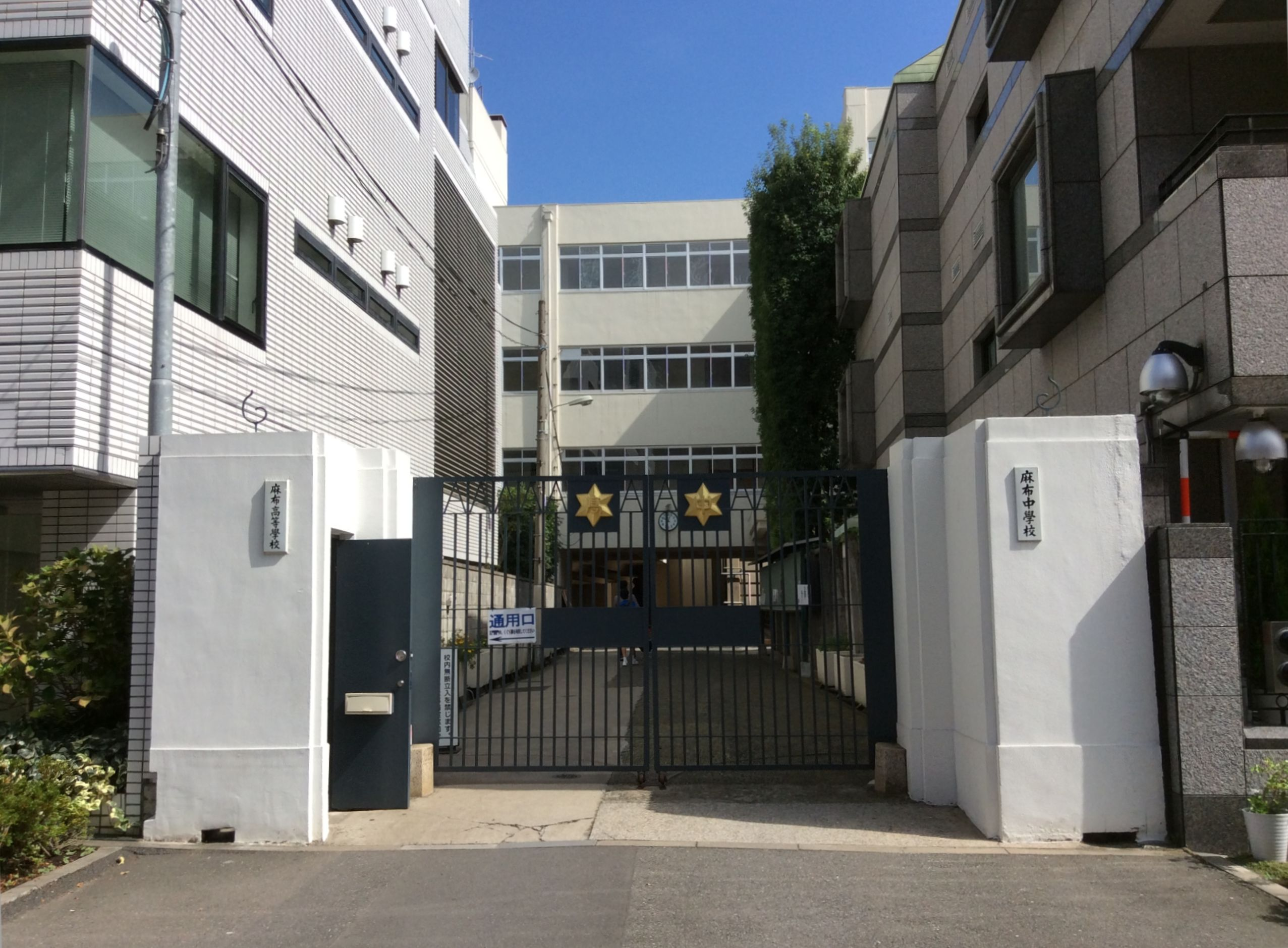 麻布中学・高等学校